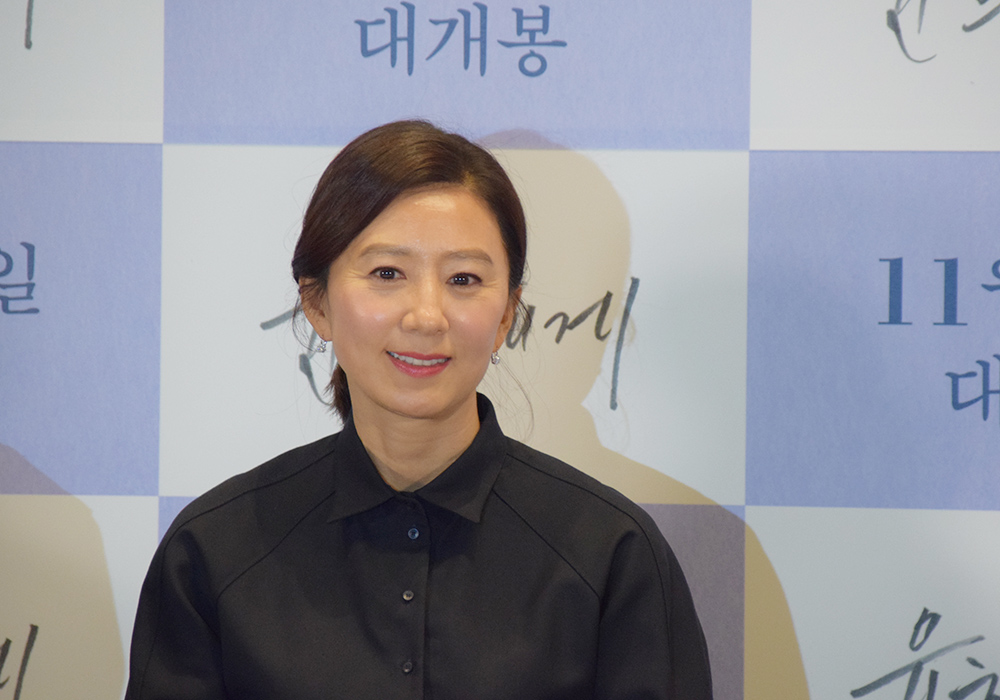 영화 '윤희에게' 시사회 현장 (2019.11.5 서울 롯데시네마건대입구)